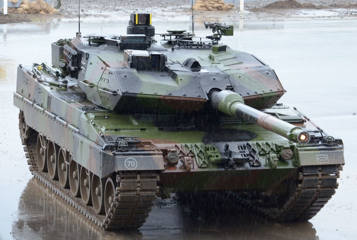 Eine Informationslehrübung (ILÜ) der Bundeswehr am 24.09.2012 in Bergen-Hohne Training Area.